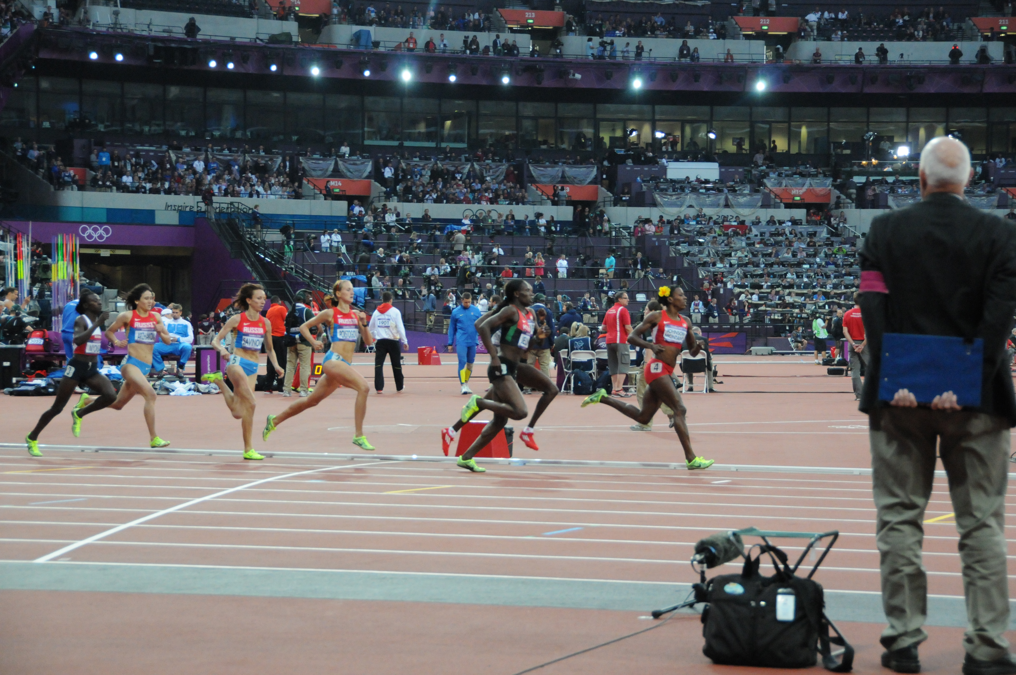 Dernier tour de la finale du 800 féminin des JO de Londres